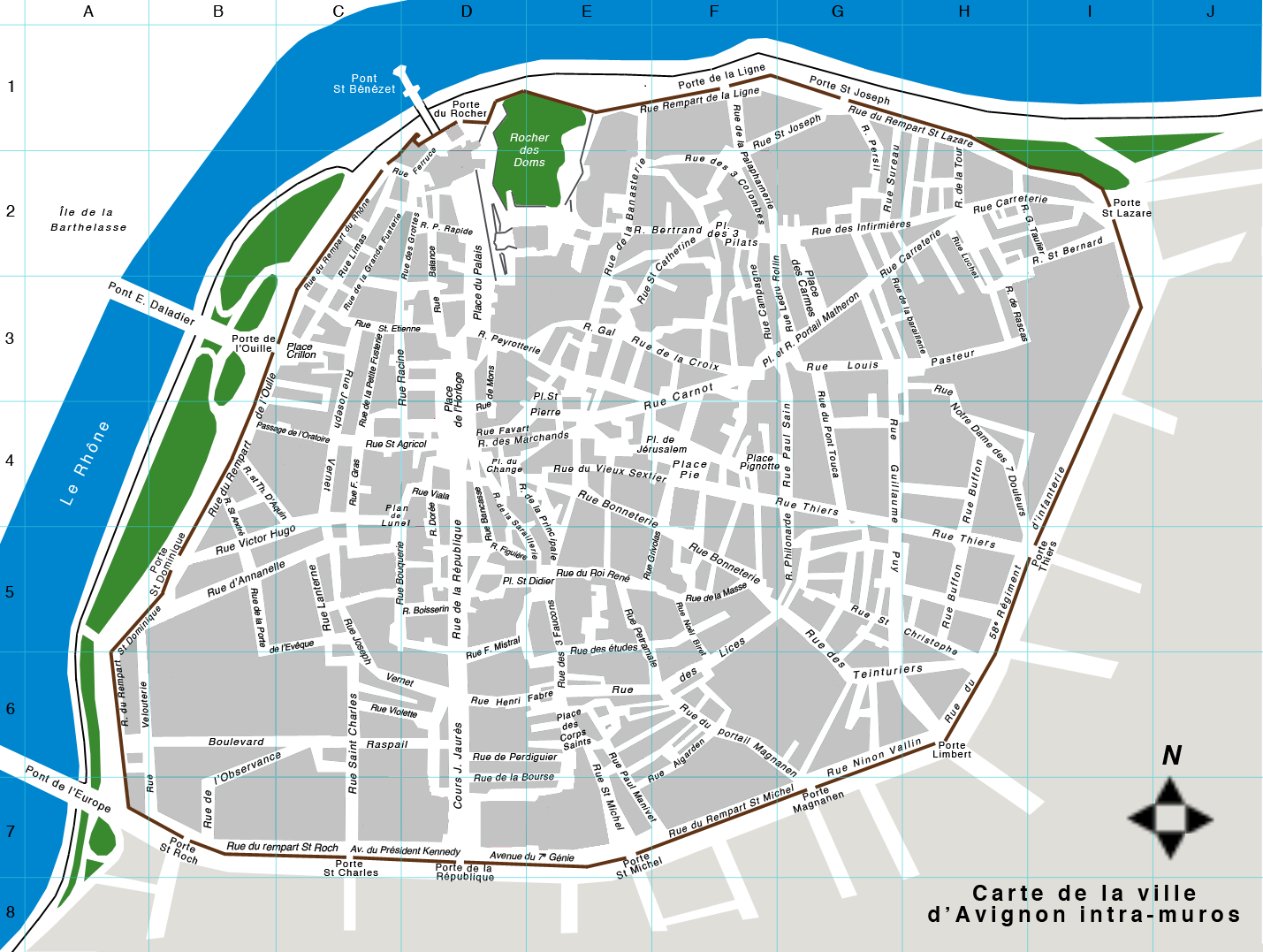 Carte de la ville d’Avignon intra-muros